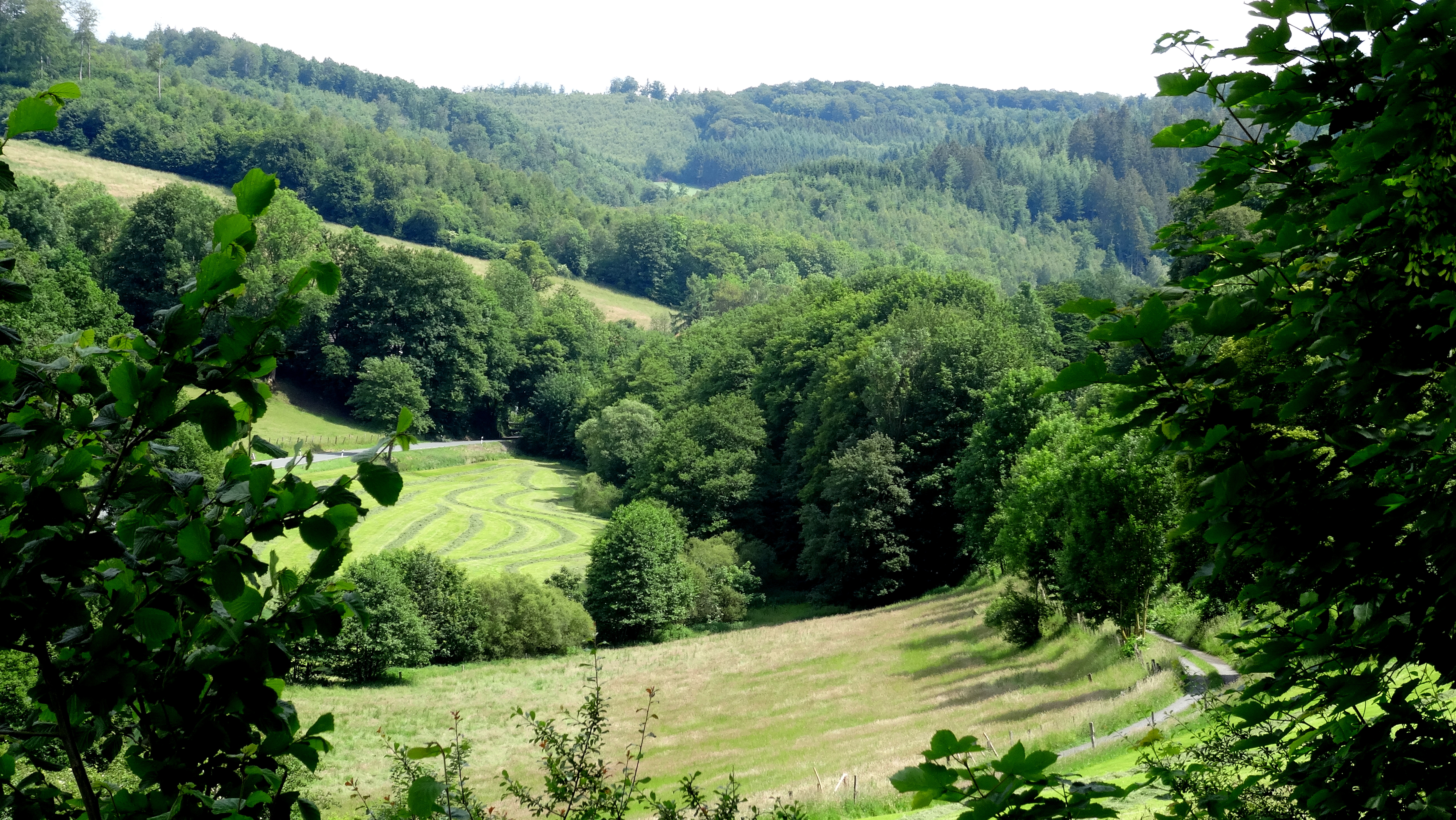 Schürenbachtal nördlich von Mülsborn